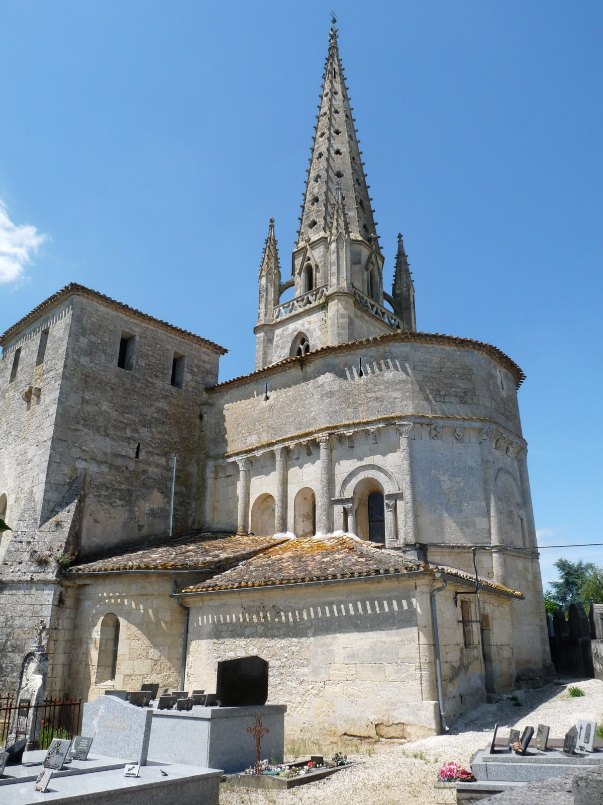 Eglise de Salignac, Gironde, France